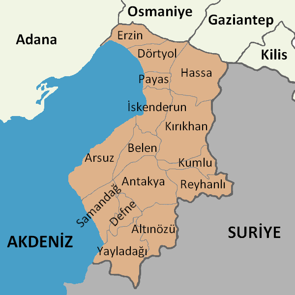 Hatay'ın ilçelerini gösteren harita